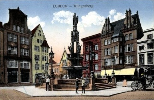 Siegesbrunnen auf dem Klingenberg in der Kaiserzeit